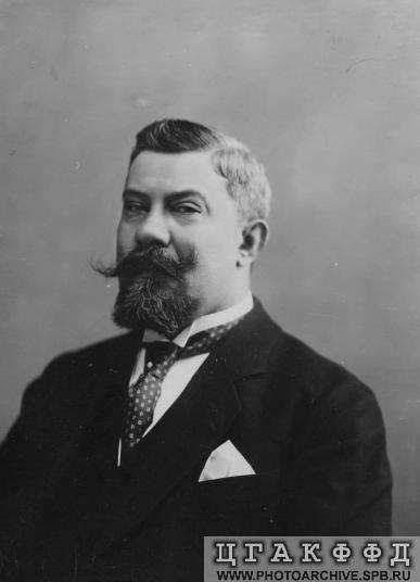 Директор департамента, товарищ министра внутренних дел С.П.Белецкий (портрет).